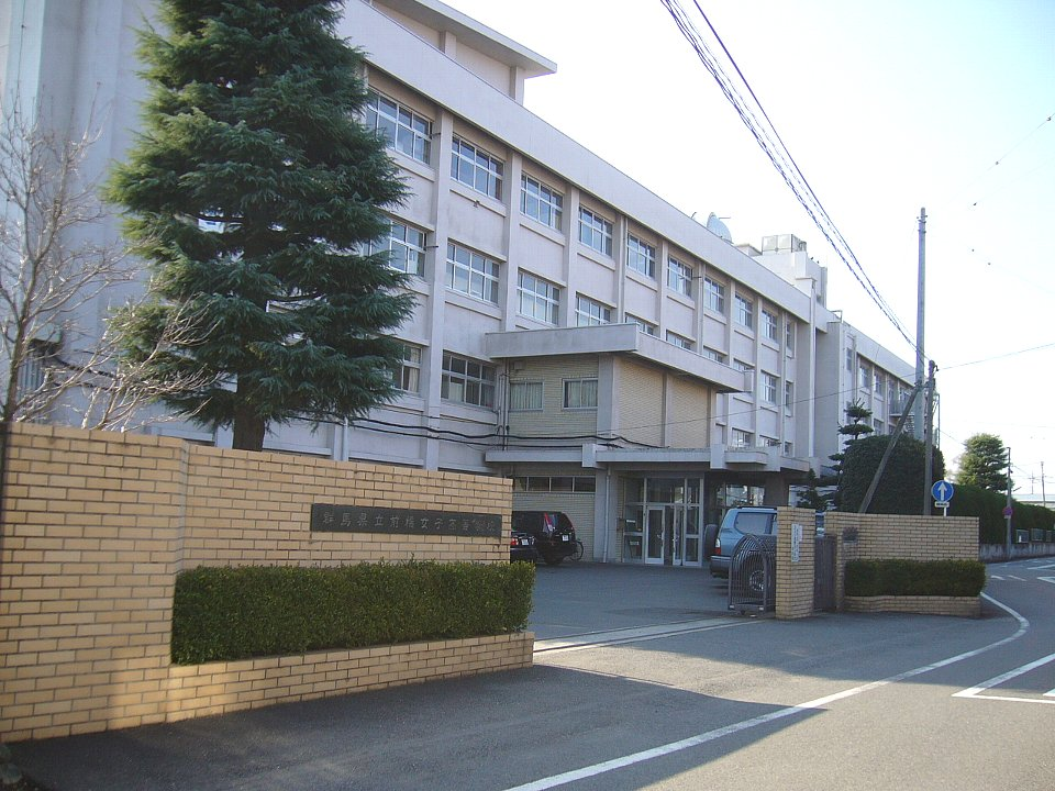 群馬県立前橋女子高等学校